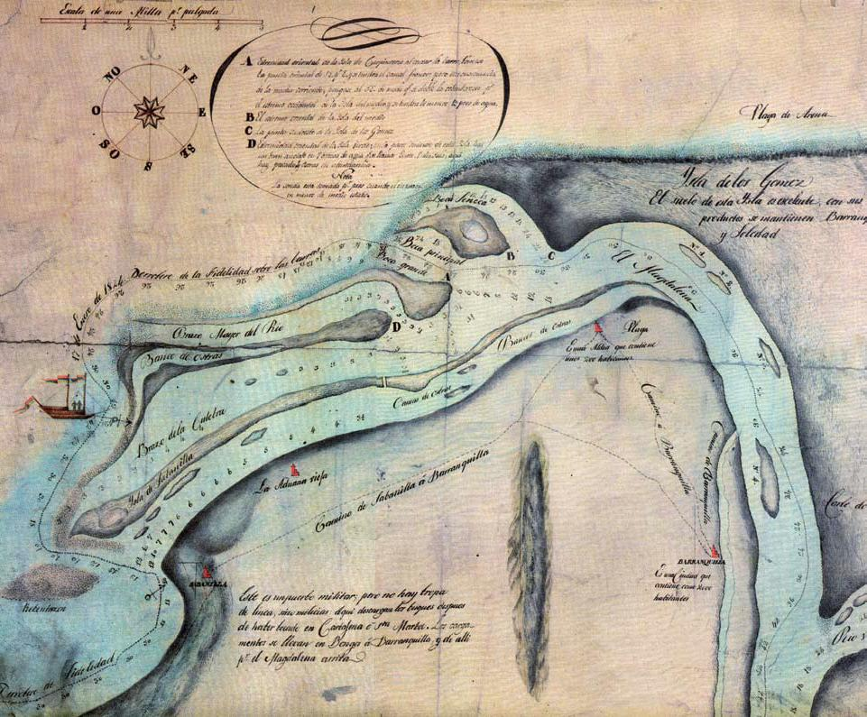 Mapa elaborado en 1824, que comprende el sector del río Magdalena entre Barranquilla y Sabanilla - Archivo General de la Nación, Bogotá.